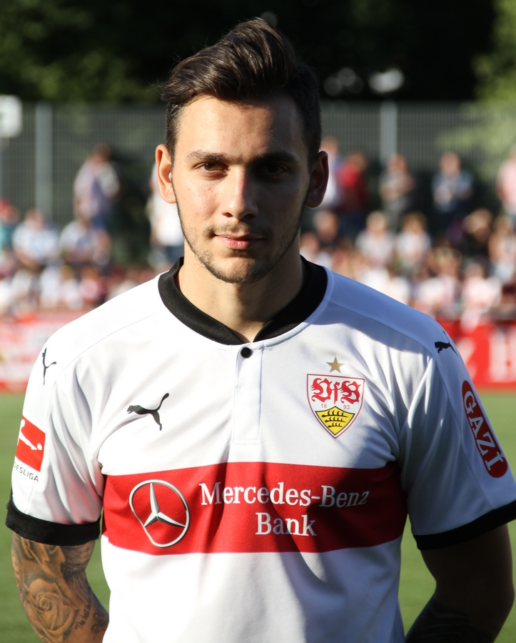 Neuzugang Anastasios Donis beim Auftakttraining